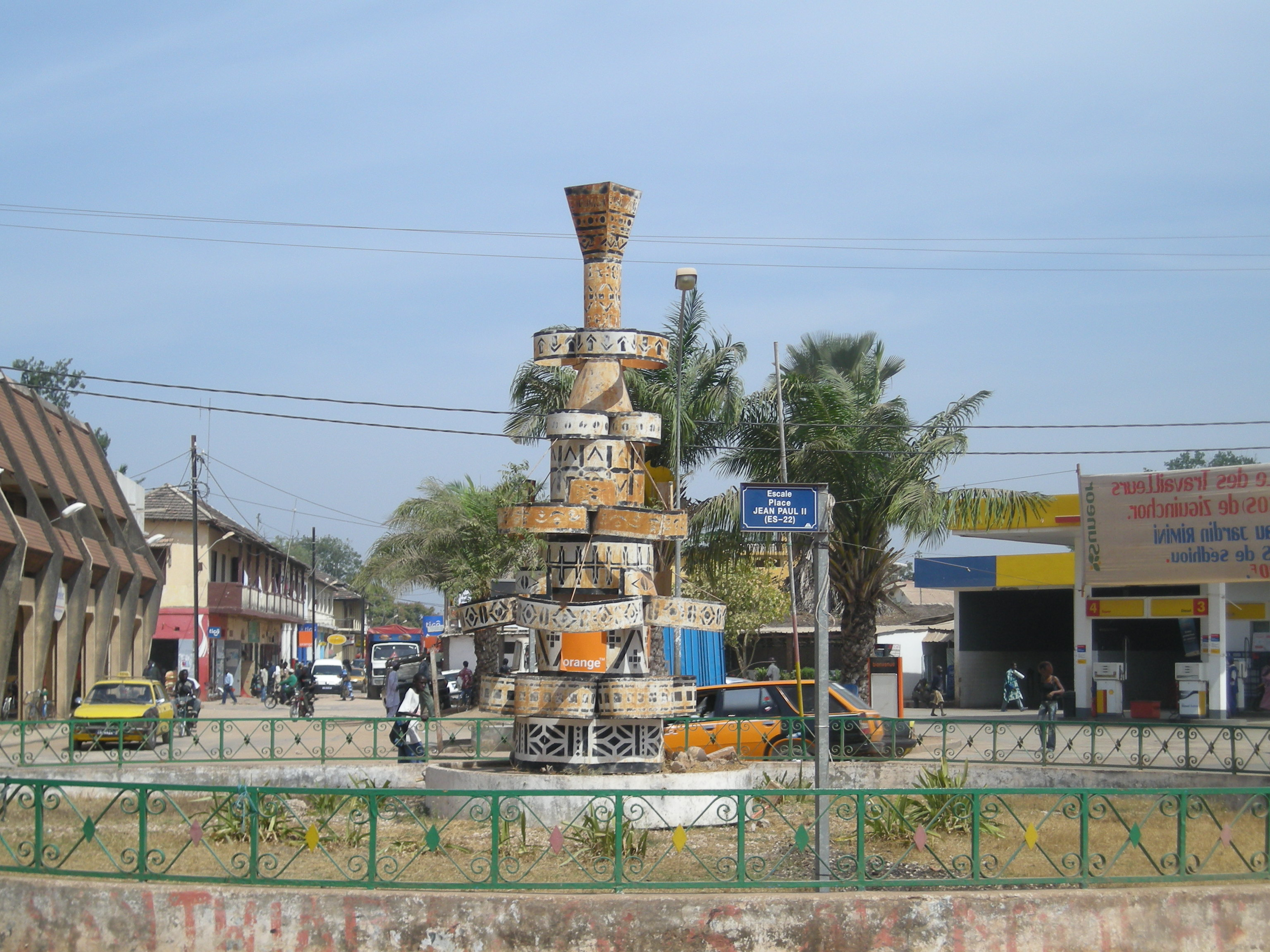 La place Jean-Paul II dans le quartier Escale à Ziguinchor (Casamance, Sénégal)